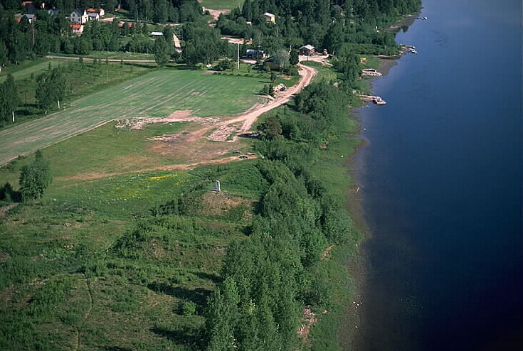 Styresholm